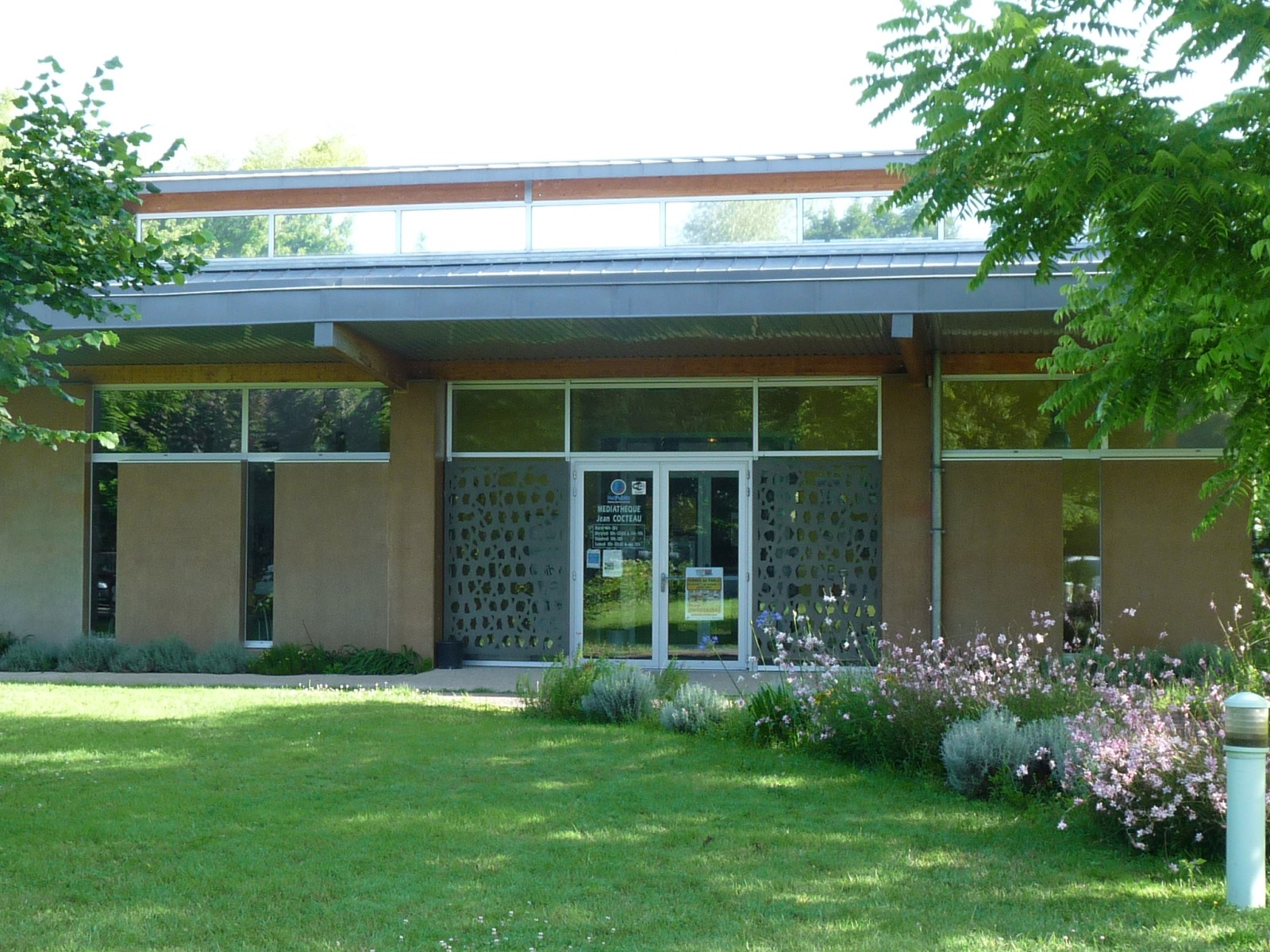 Médiathèque Jean-Cocteau, St-Seurin-sur-l'Isle, Gironde, France